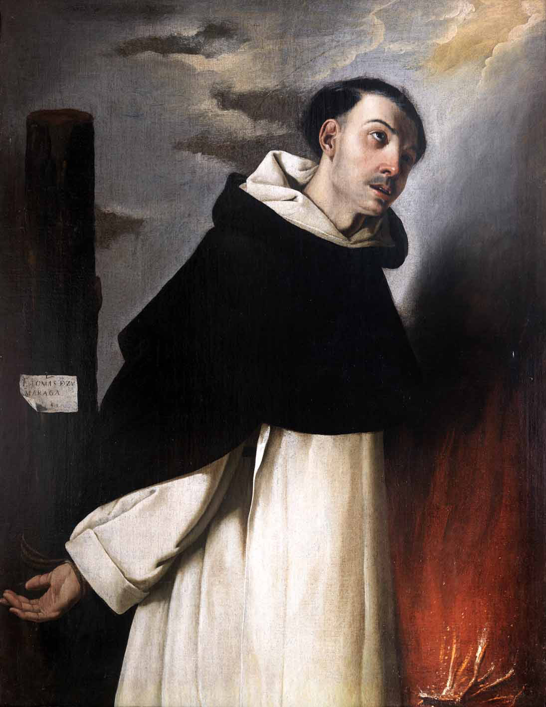 Beato Tomás de ZumárragaBlessed Thomas of Zumárragatitle QS:P1476,es:"Beato Tomás de Zumárraga" label QS:Les,"Beato Tomás de Zumárraga"